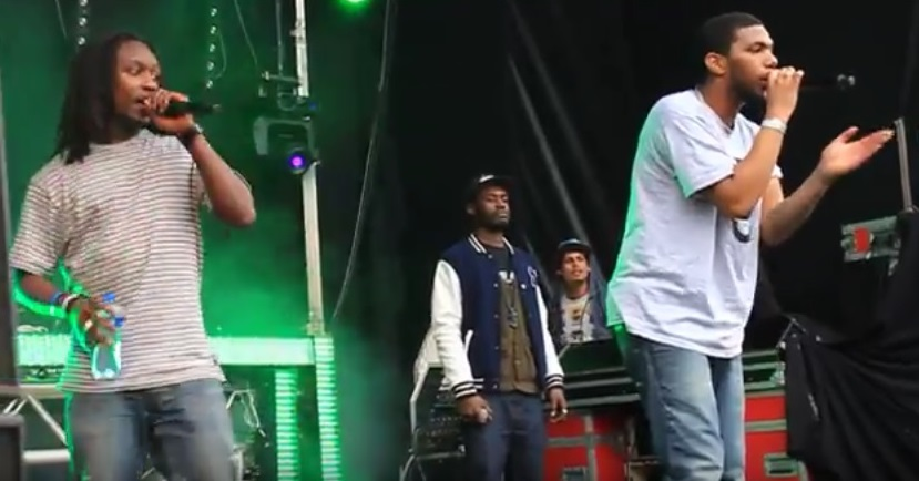 Zwart Licht in Deventer, 17 mei 2012